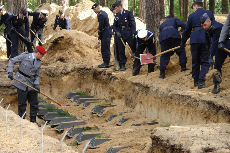 Angehörige des Logistikbataillons 172 aus Beelitz bei einer Einbettung auf dem Waldfriedhof in Halbe